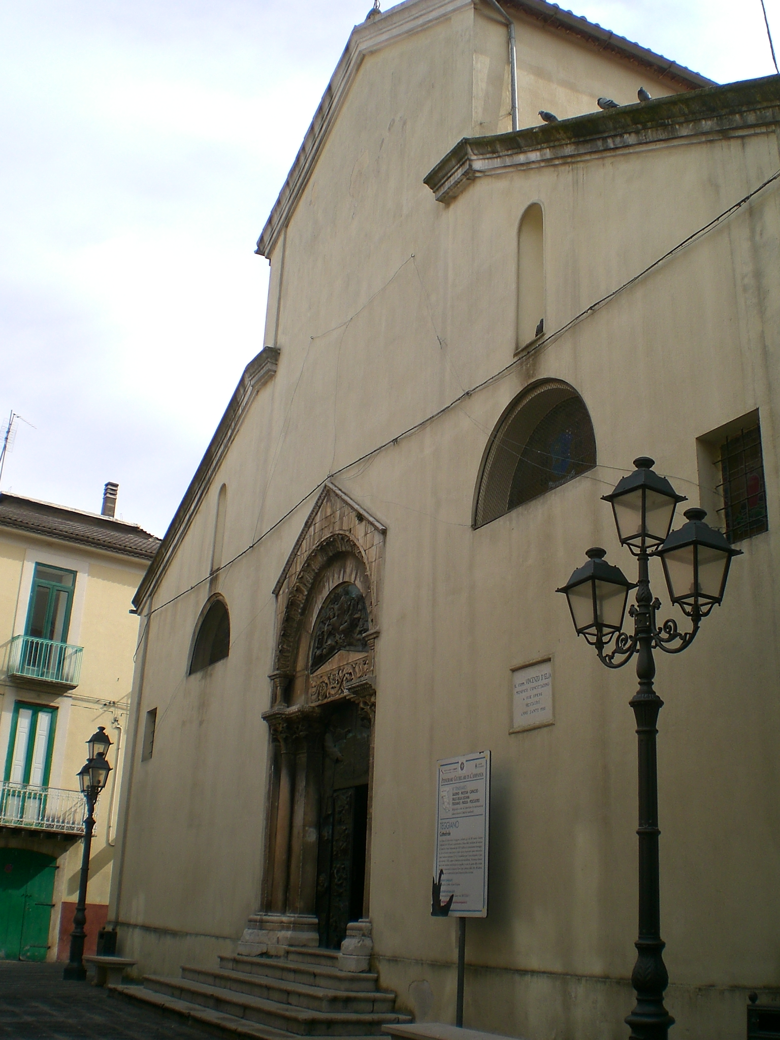 Facciata della Cattedrale di Santa Maria Maggiore a Teggiano.